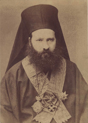 Васил Друмев (Климент Търновски): Чернобяла снимка на Васил Друмев (Климент Търновски) Велико Търново 1887